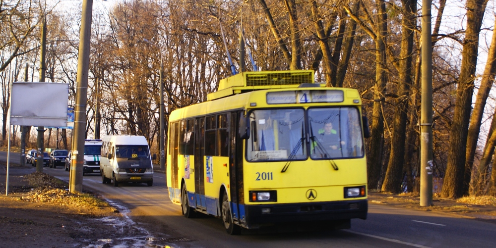 ЛАЗ-52522 №2011: ЛАЗ-52522 №2011 на вул.Московскої Олімпіади. Чернівці.